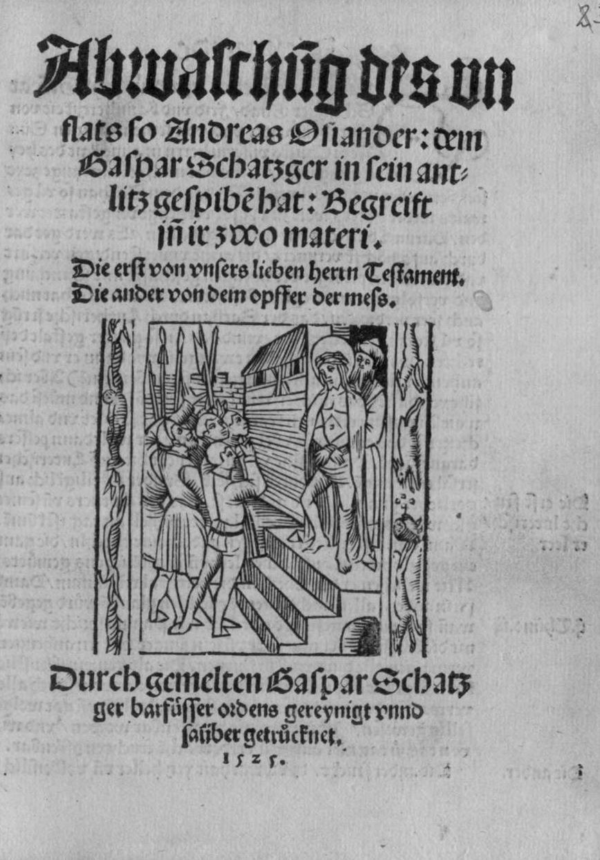 Titelblatt einer Flugschrift von Kaspar Schatziger gegen Andreas Osiander